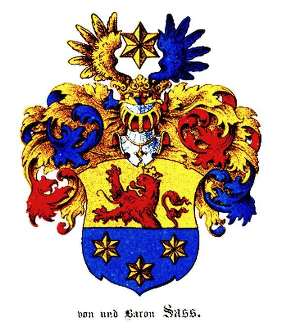 Von Sasside perekonna vapp 19. sajandist.